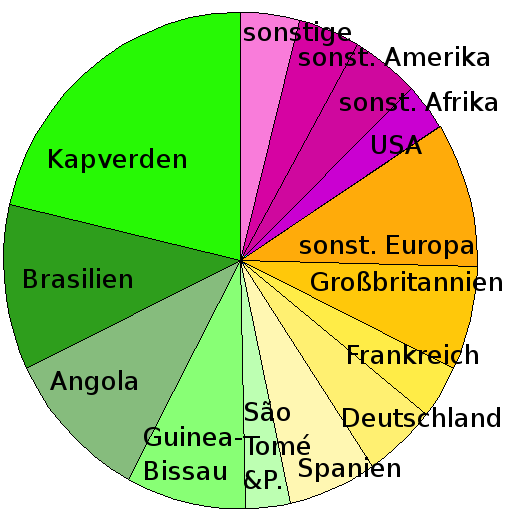 Herkunftsländer der Ausländer in Portugal